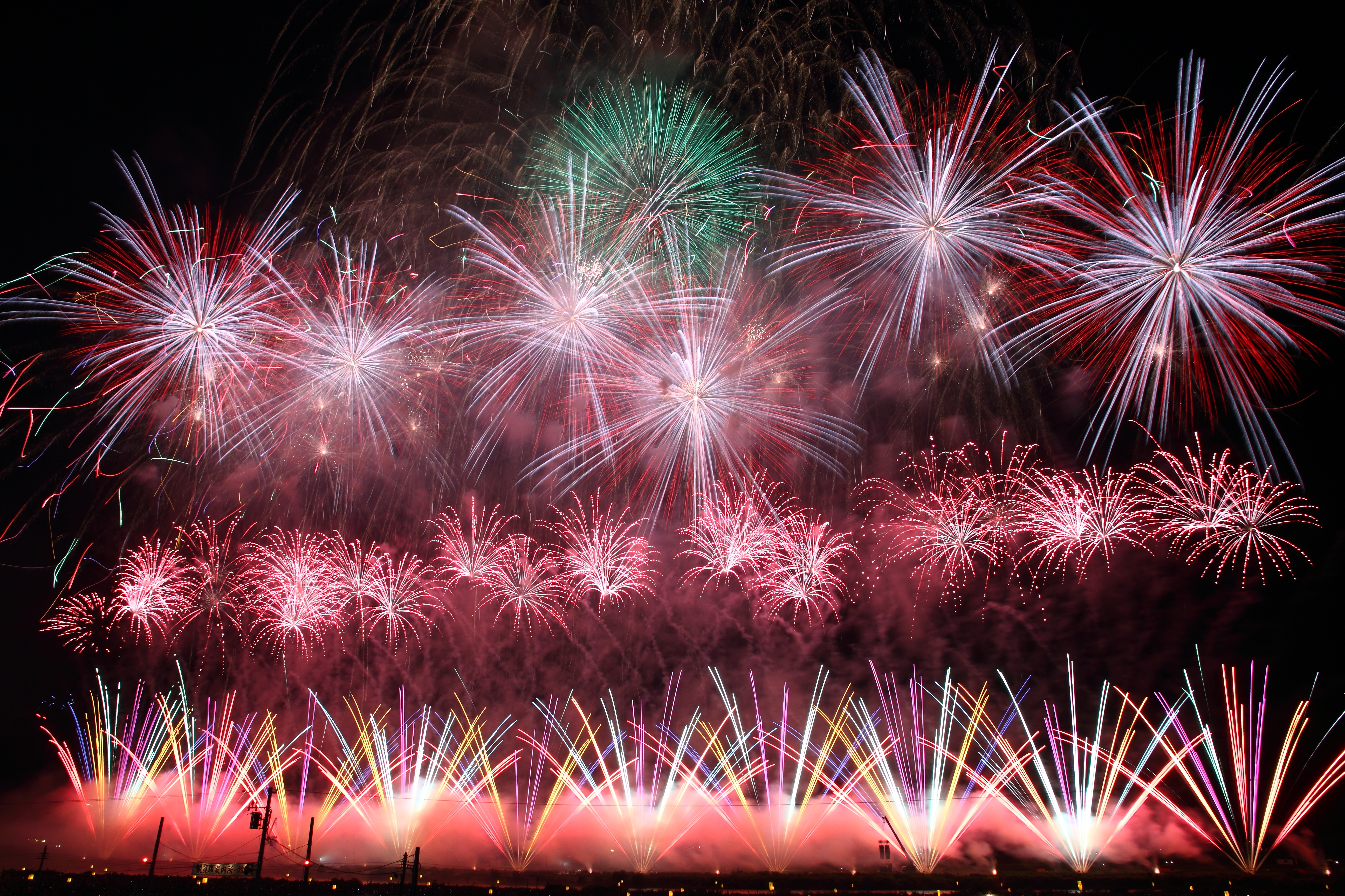 大会提供花火（2014）ボレロの曲に乗せて約6分間の壮大な打上で76万人の観客を魅了した。